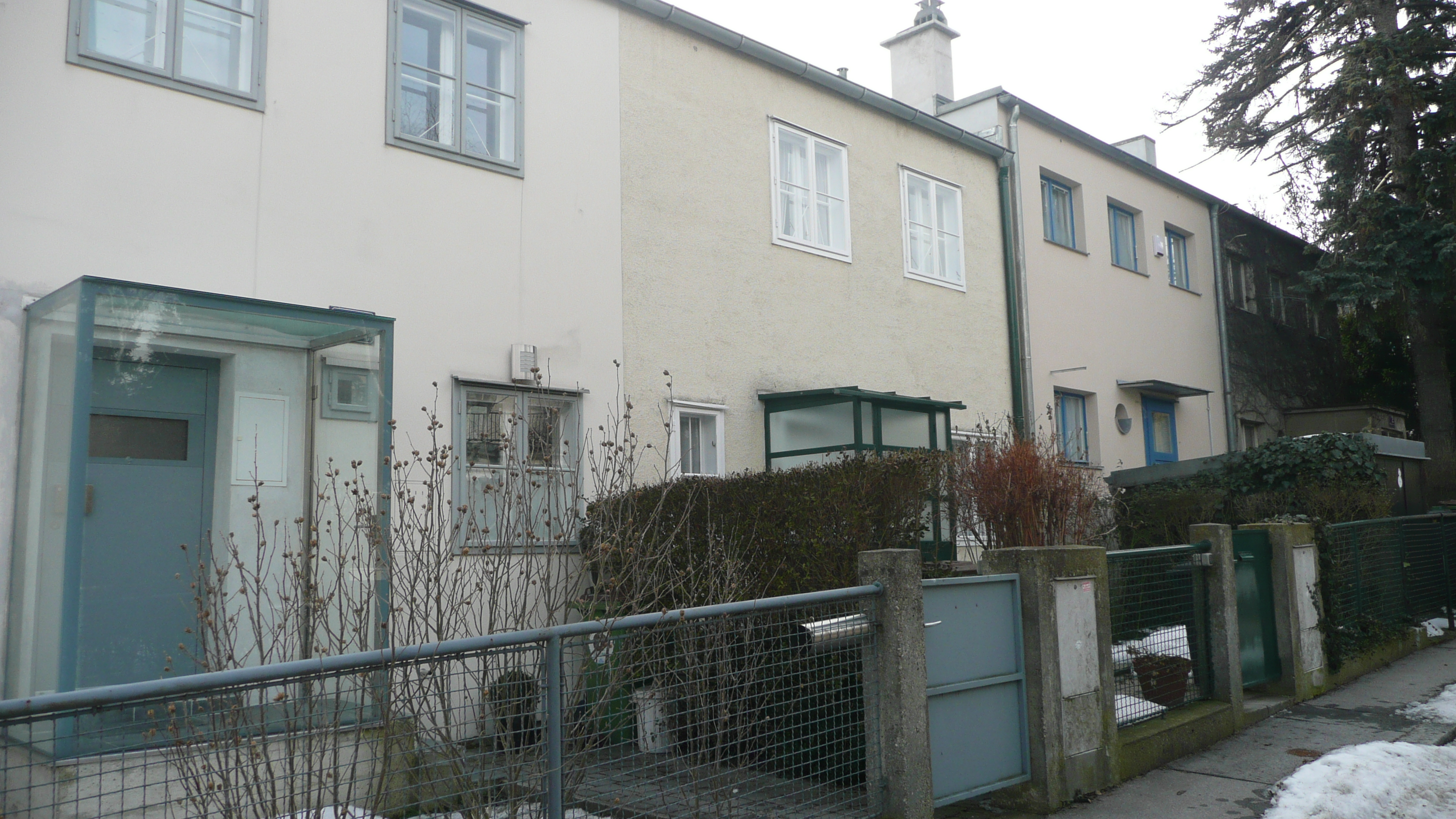 Werkbundsiedlung Wien, Woinovichgasse 2-8